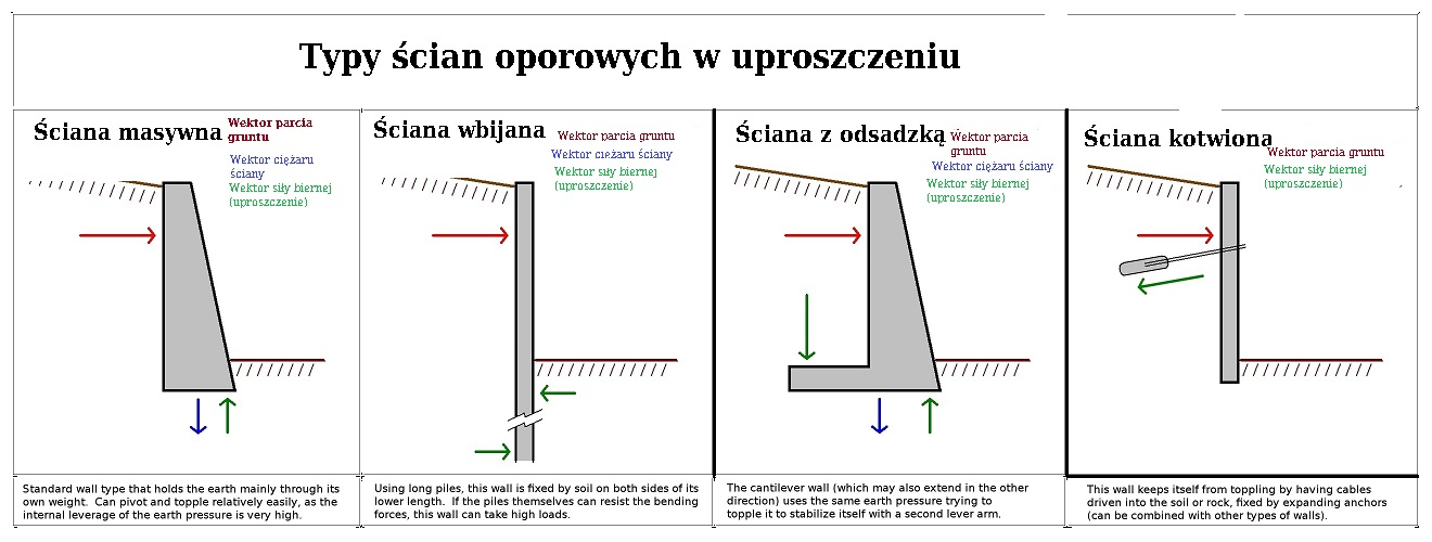 Ściany oporowe podział